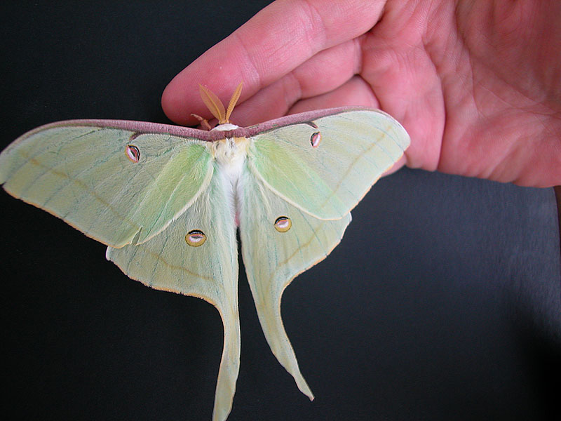 Luna Moth (Actias luna)